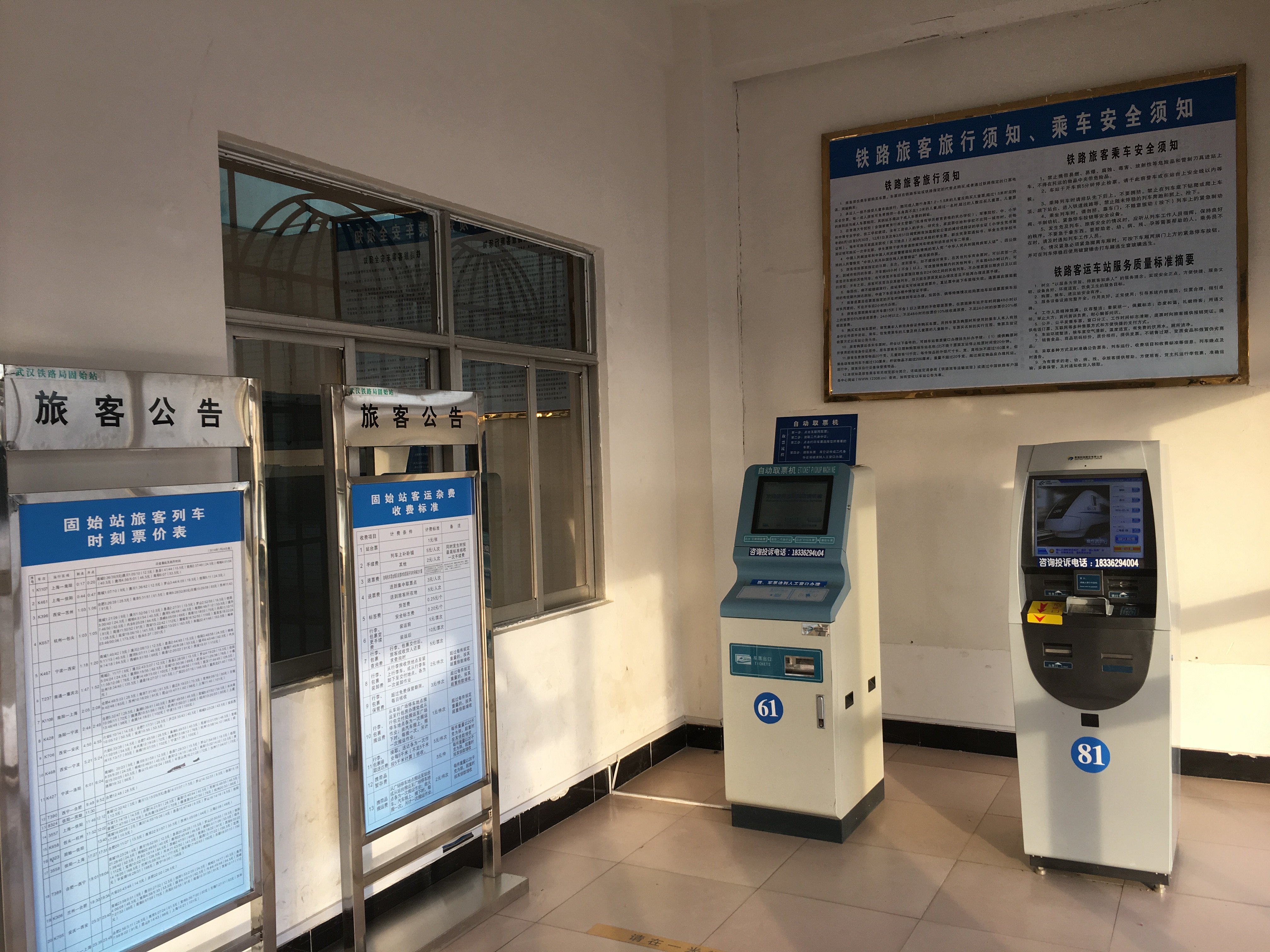 中文（中国大陆）: 固始站售票处内设置的自动售票机